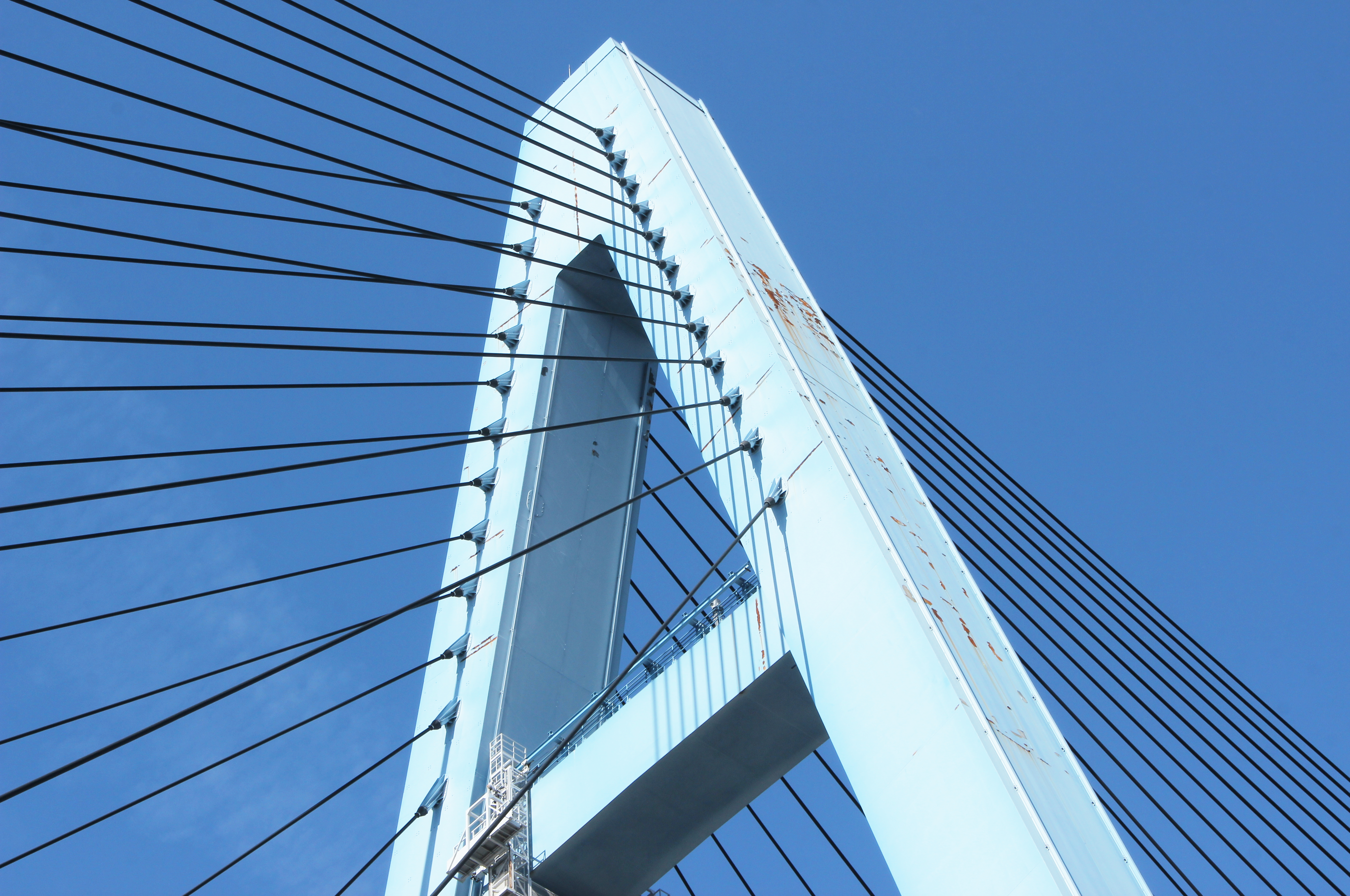 名港東大橋ケーブル定着部